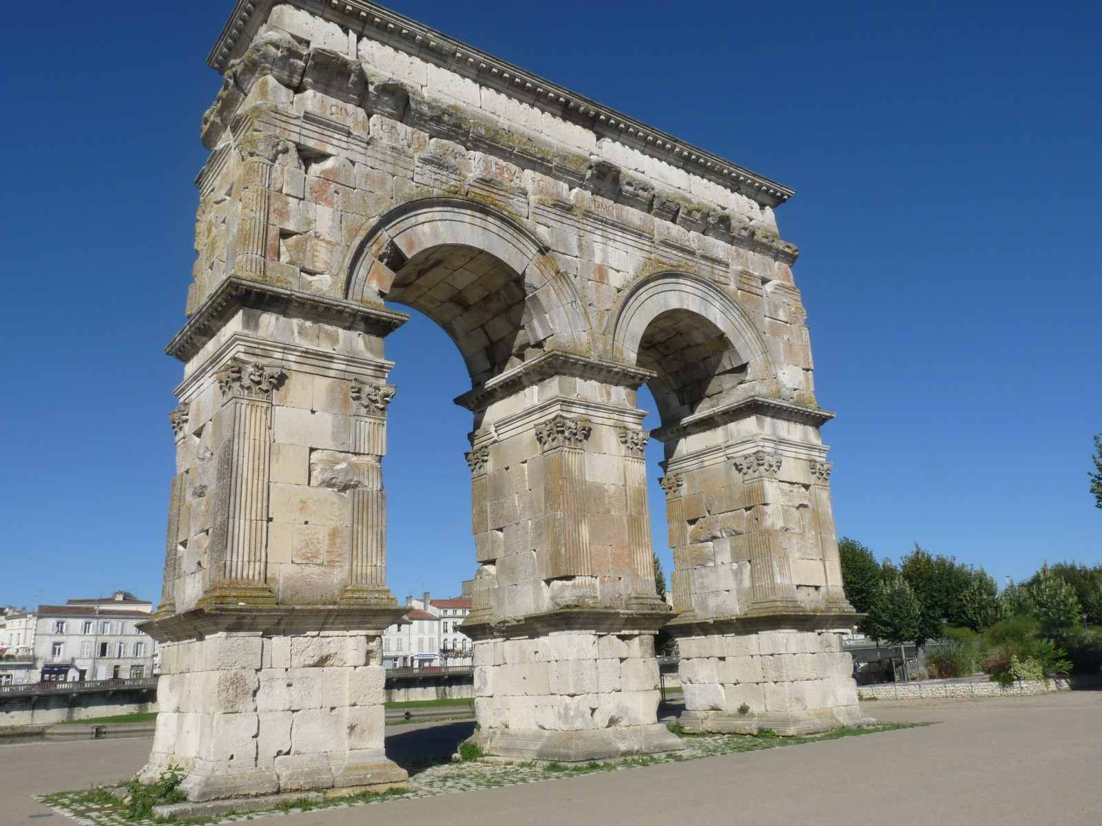 Arc de Germanicus, Saintes, Charente-Maritime, France